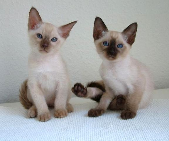 Chatons tonkinois chocolat mink et seal point (chatterie de l'Esprit d'Edenvane)